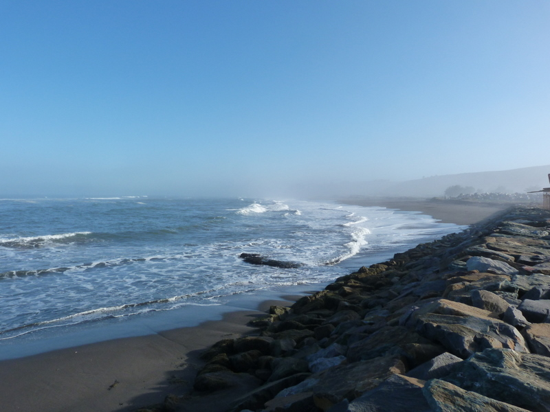 Costa de Iloca (centro-sur).